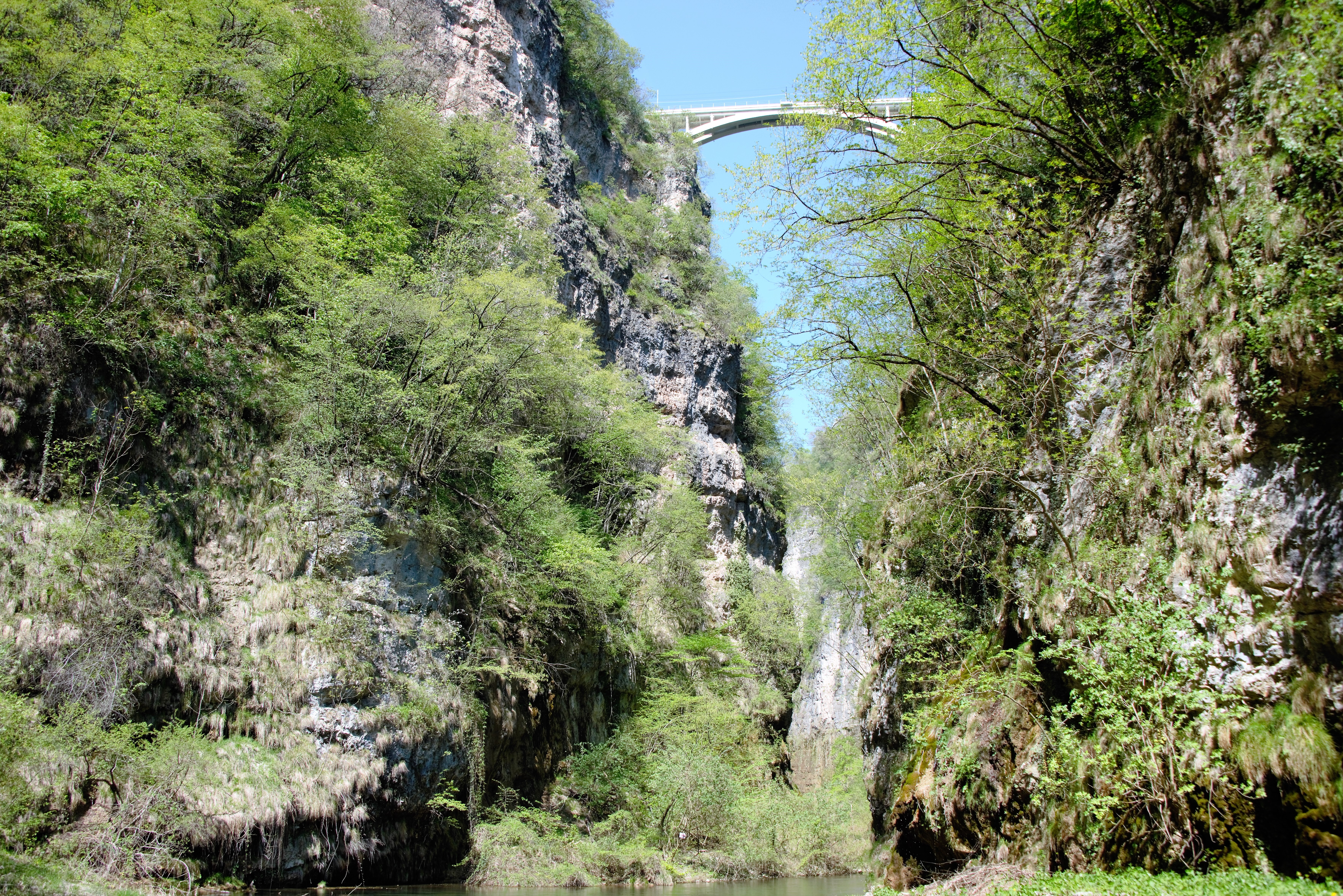 Forra di Santa Giustina (Q49967107)